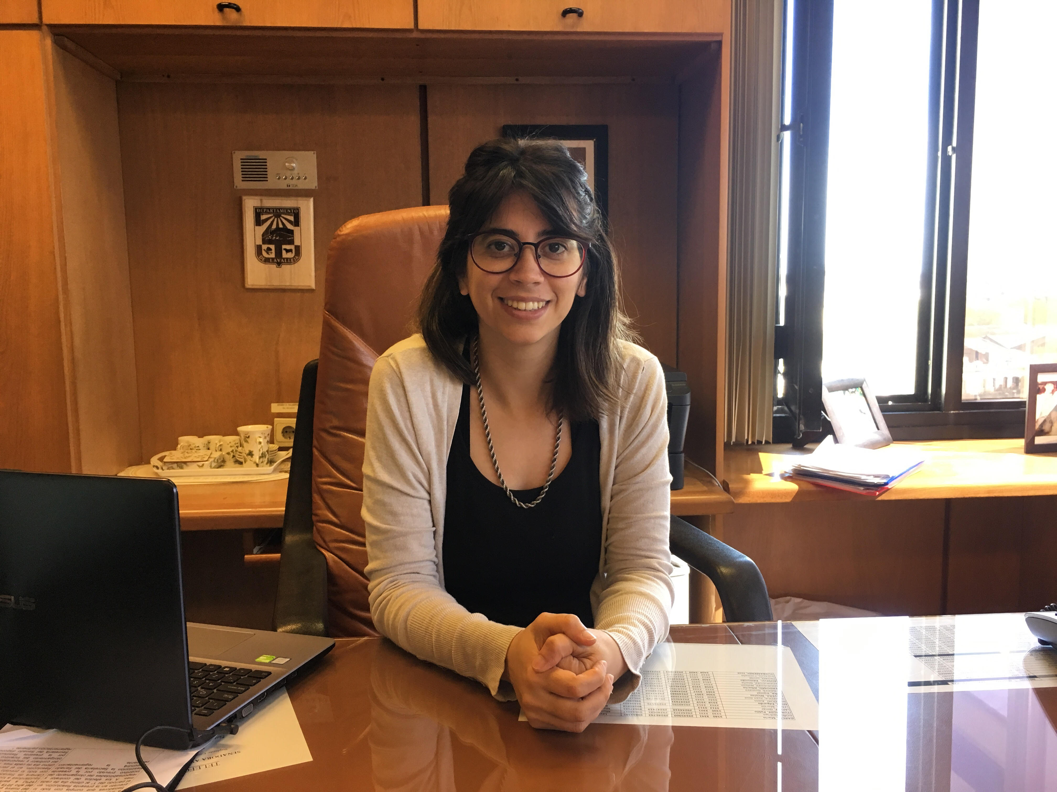 Camila Ramírez